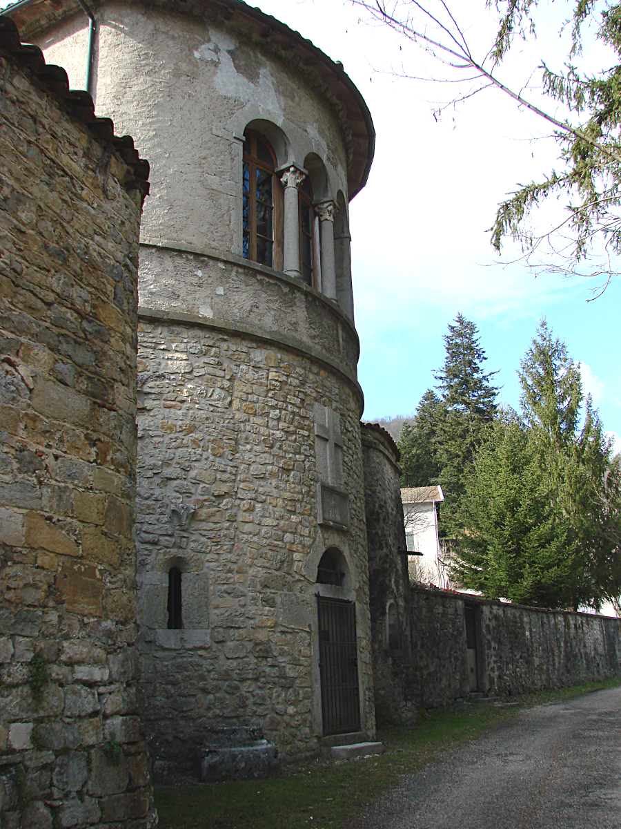 Façade de la crypte de l'Abbaye de Saint-Rambert-en-Bugey